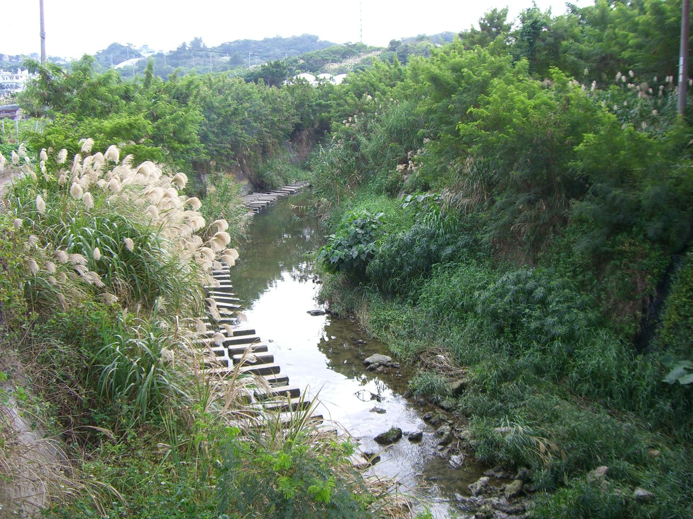 Futenmagawa river, Okinawa, Japan.(北中城村安谷屋付近を流れる普天間川)